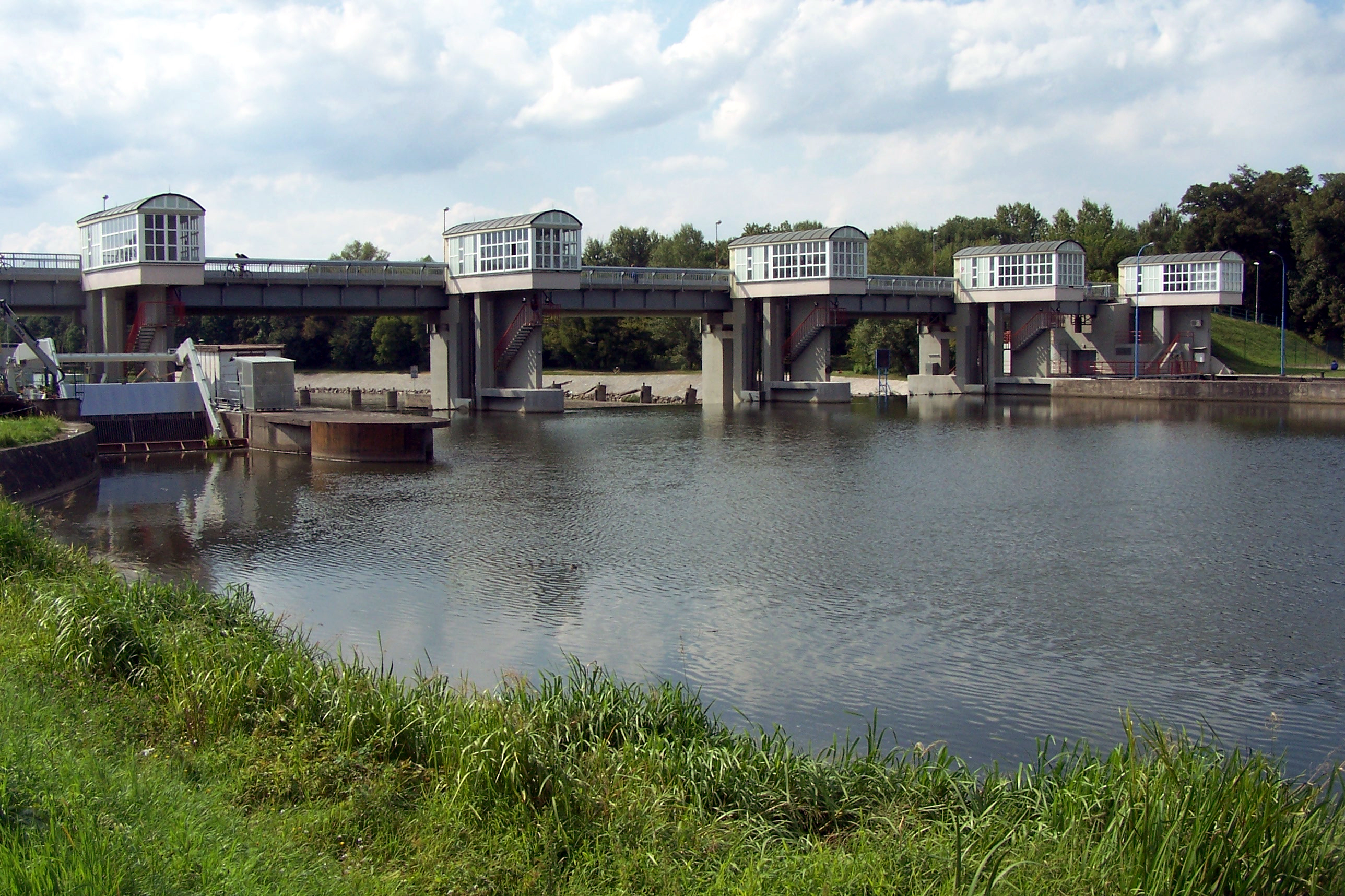 Zdymadlo v Pardubicích